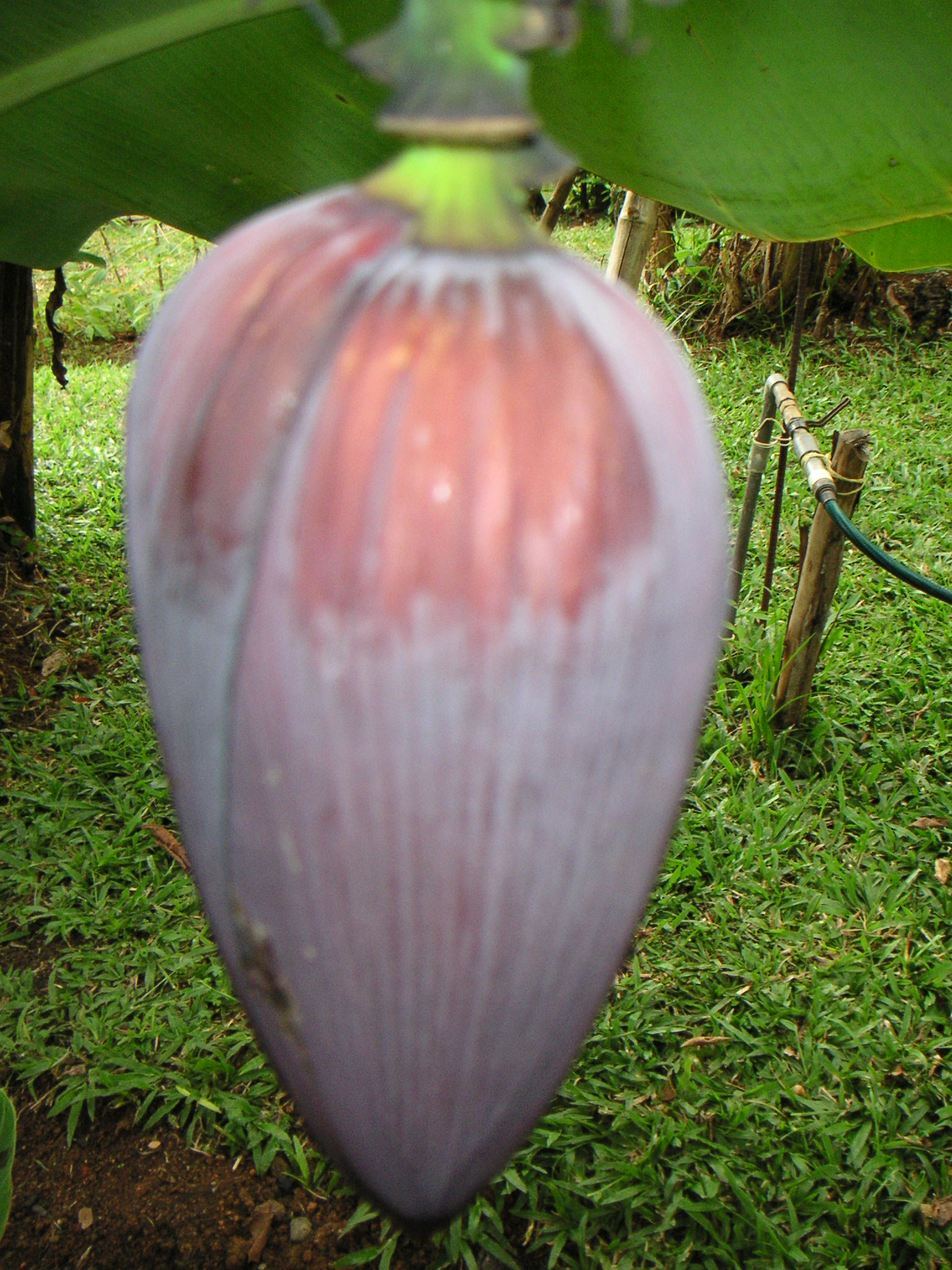 Bananenpflanze in Cali, Kolumbien